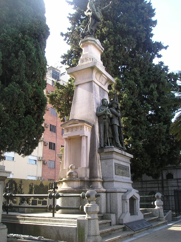 Panteón de los muertos de la Revolución de 1890. Cementerio de La Recoleta. Buenos Aires.